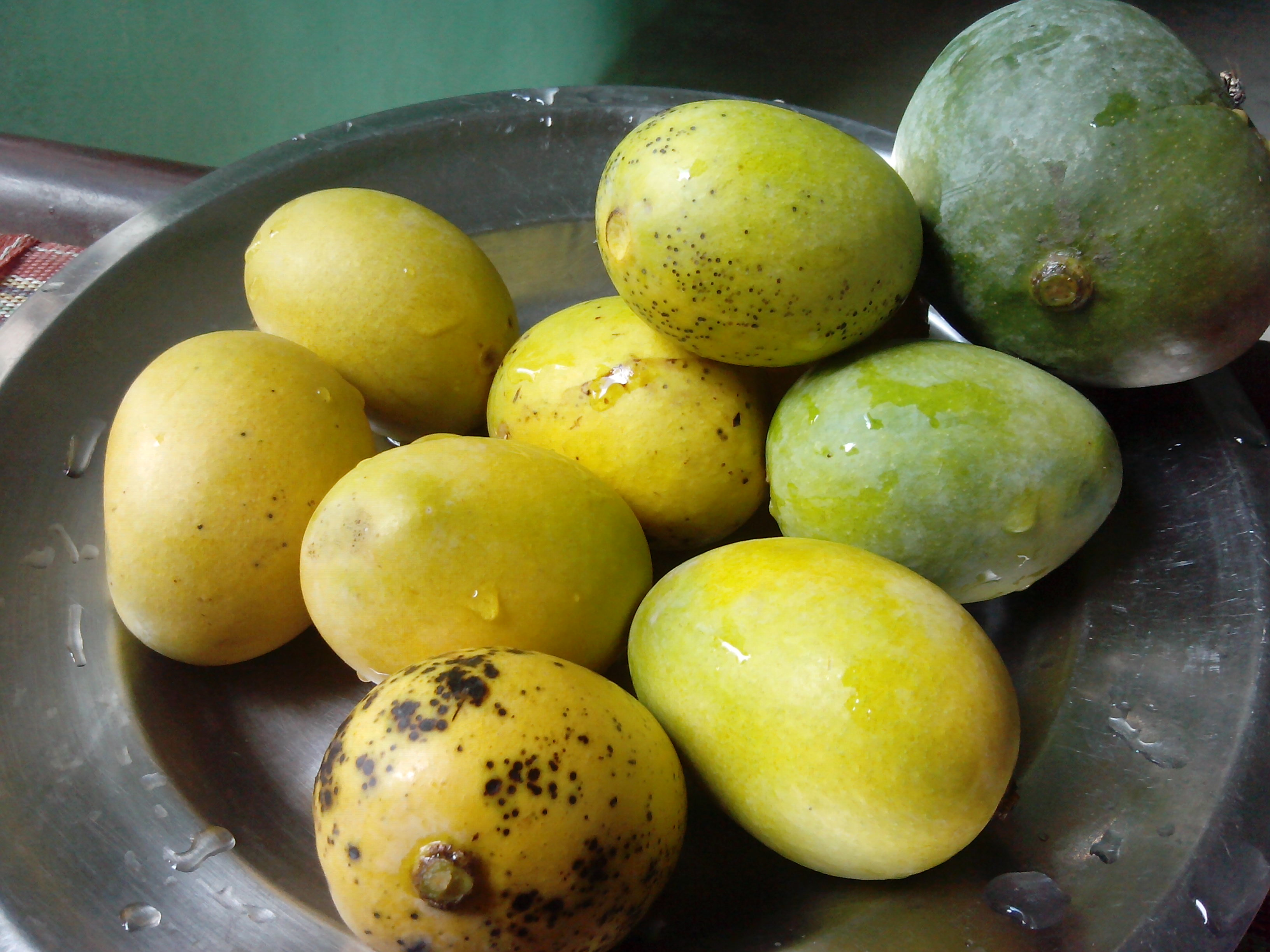 Mangos